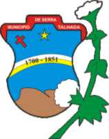 Brasão do município de Serra Talhada-PE